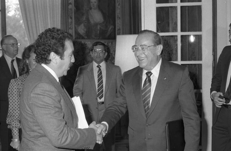 11.-15.10.1986 Besuch des Präsidenten von Guatemala, Lic. Marco Vinicio Cerezo Arévalo, und seiner Frau Lic. Raquel Blandon De Cerezo in der Bundesrepublik Deutschland. Gespräch mit Dr. Friedrich Zimmermann- Bundesministerium des Inneren- auf Schloß Gymnich.